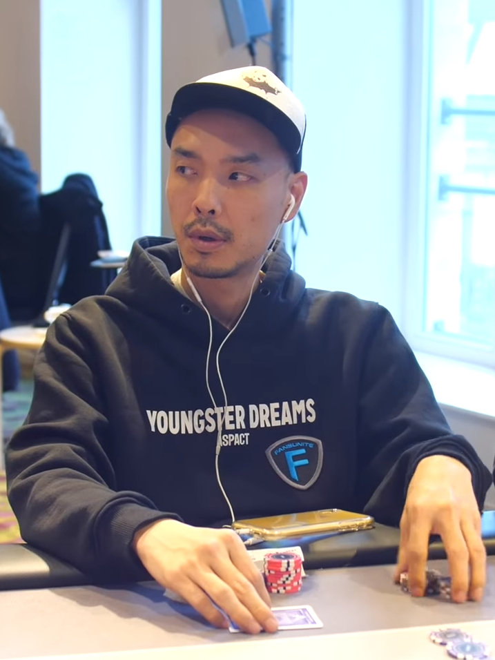 David Rheem bei der WPT Deeptstacks in Brüssel